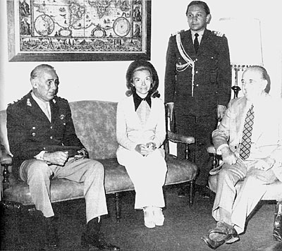 Isabel Perón, entre el teniente general Leandro Enrique Anaya y el canciller Juan Alberto Vignes durante su estadía en Chapadmalal.